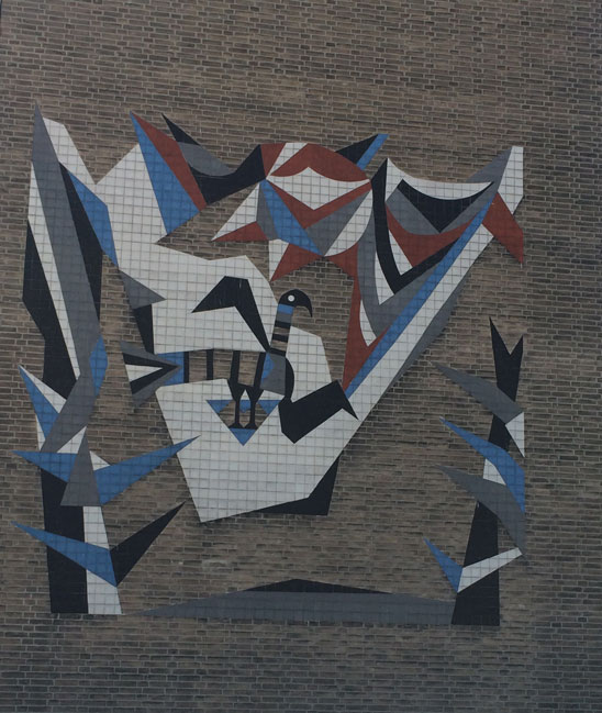 Wandkunst Phoenix van Raymond Both op flatgebouw Burgemeester Cramergracht 1-98, hoek Burgemeester Roëllstraat